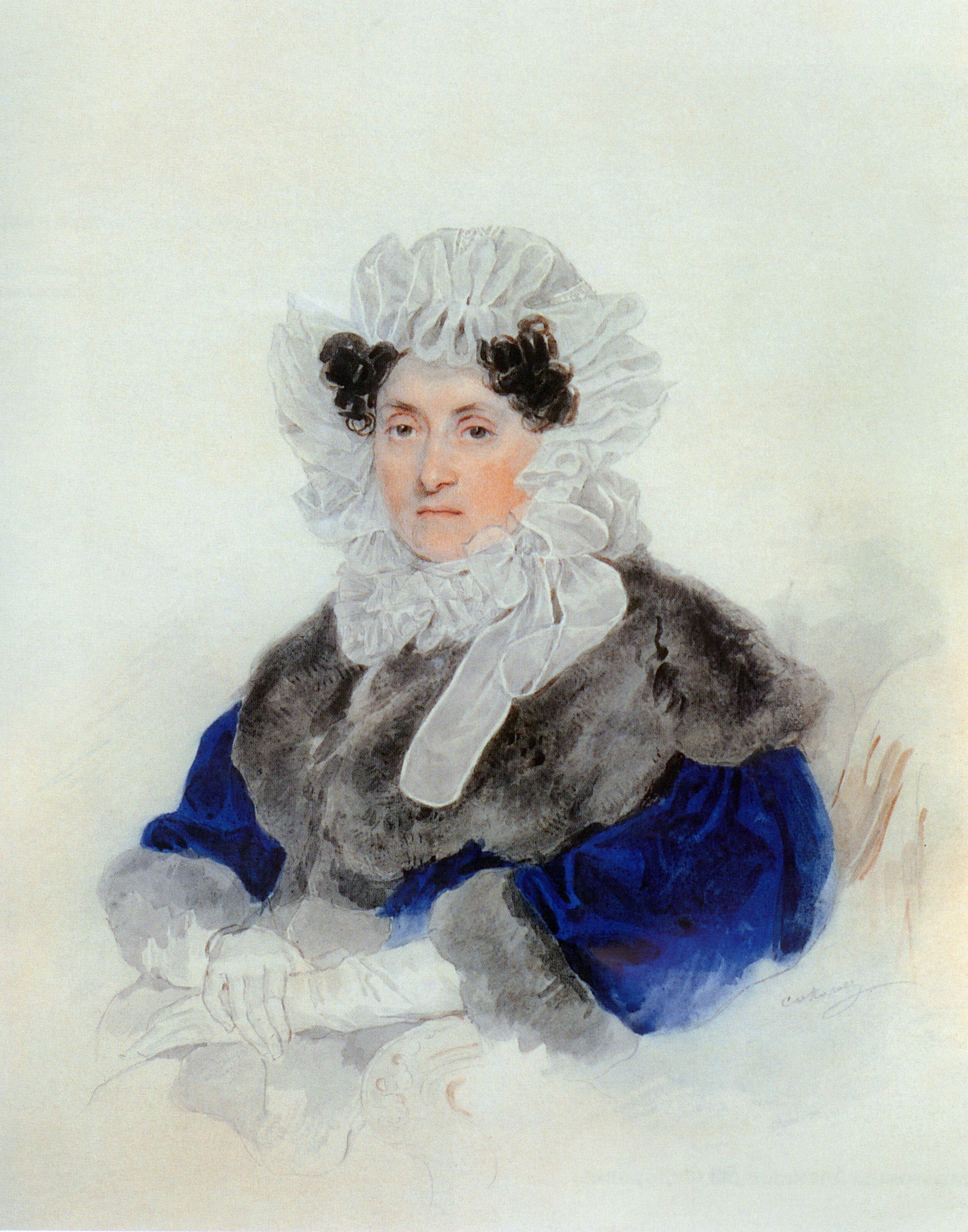 Портрет Е.А. Остерман-Толстой. 1830-ые г.г